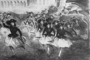 Tableau allégorique de la lagune vénitienne dans le ballet Flik et Flok au théâtre de la Scala (détail)